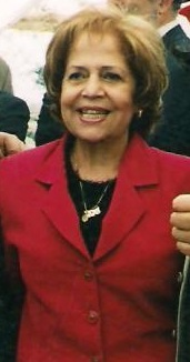 Carmen Romo Sepúlveda, Ex Alcaldesa de Quilicura (1996-2008)